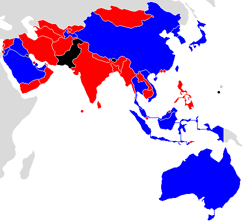 Чемпионат Азии по футболу 2018 (юноши до 19 лет) участники